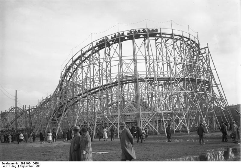 Der Höhepunkt des Oktoberfestes auf der Theresienwiese in München! Die Riesen-Gebirgsbahn, die grösste der Welt, auf der Festwiese.